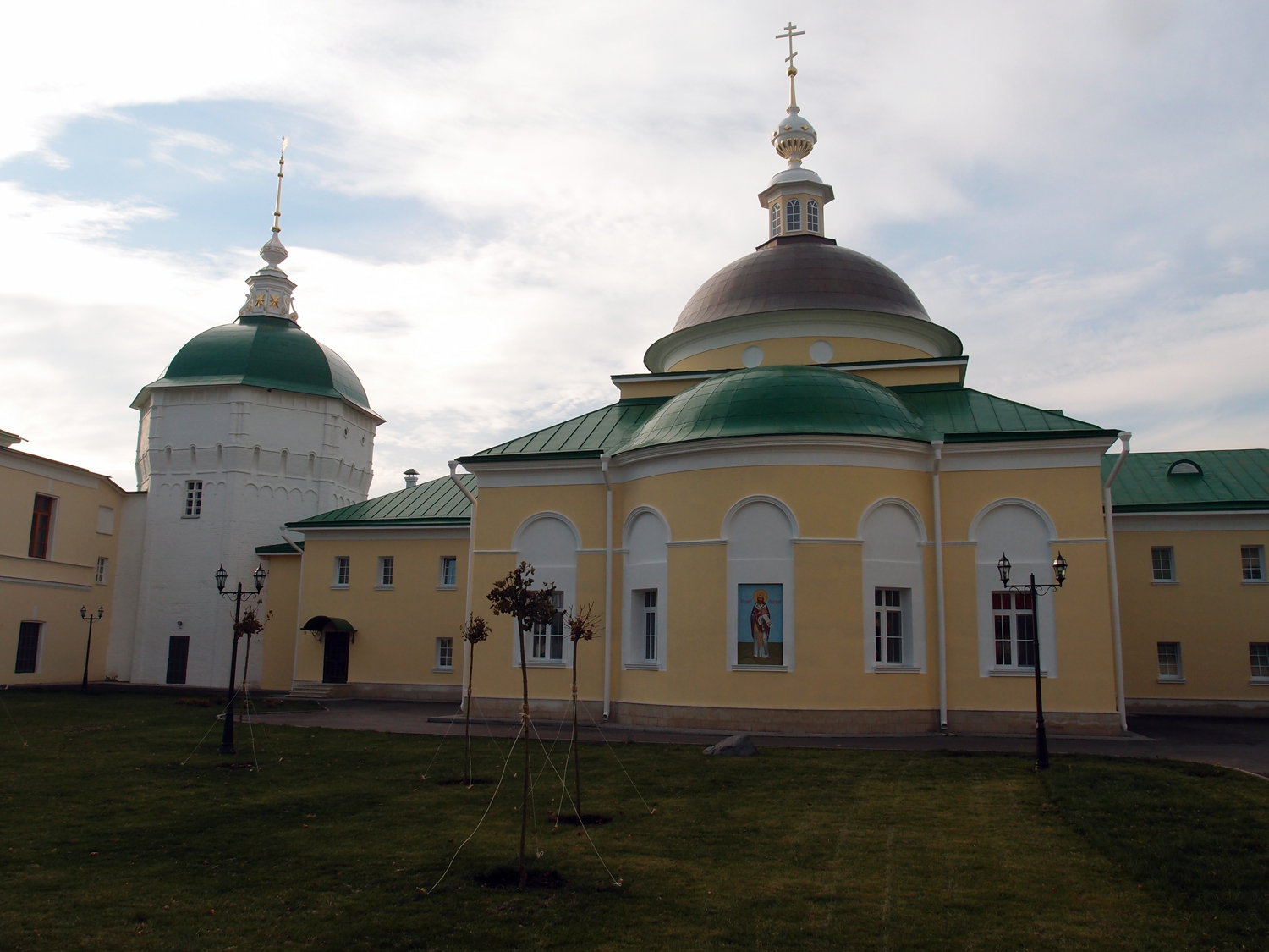 Николо-Пешношский монастырь (Москва и Московская область, Солнечногорск, село Рогачево (посёлок Луговой))